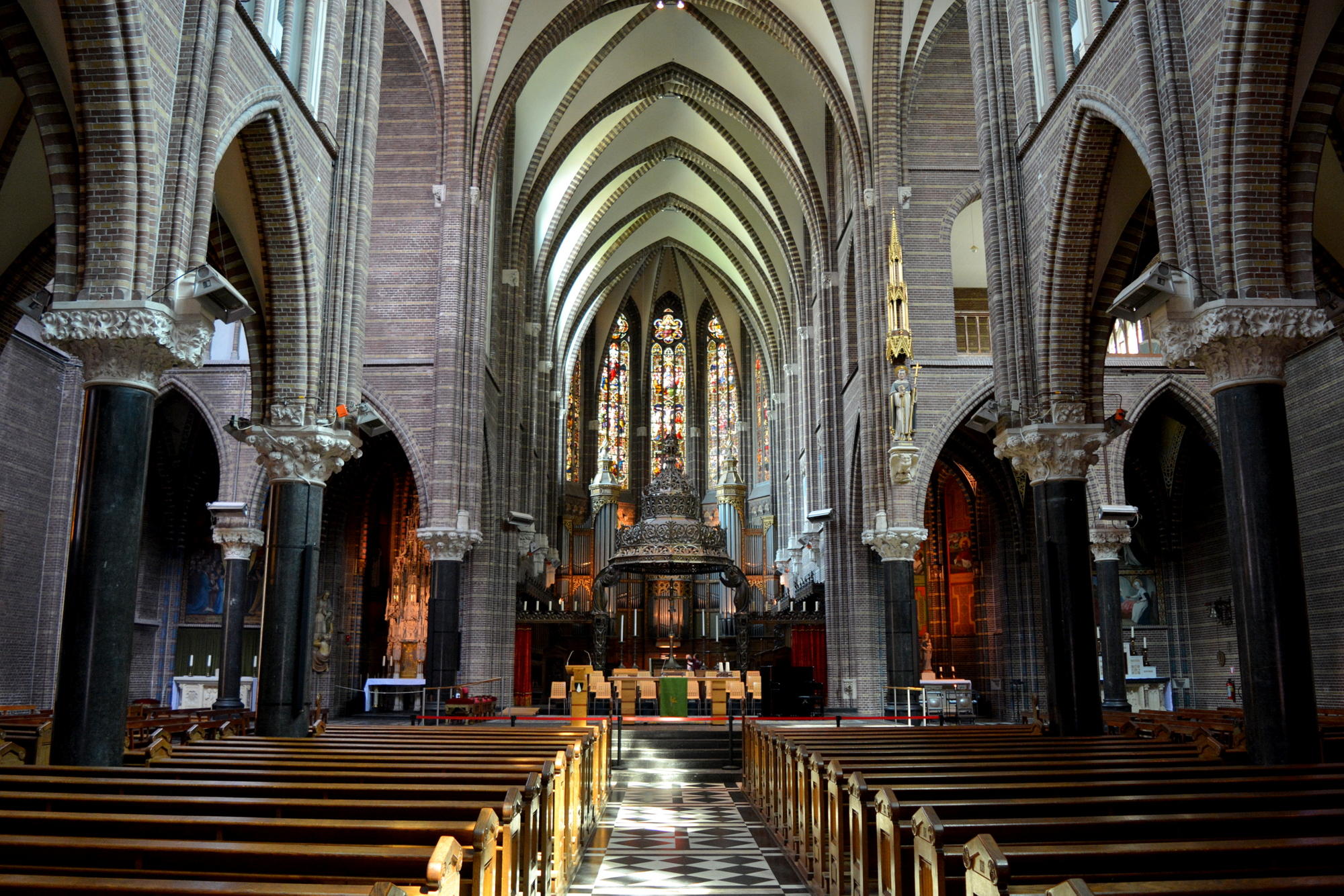 Zwolle, Dominicanenkerk, interieur